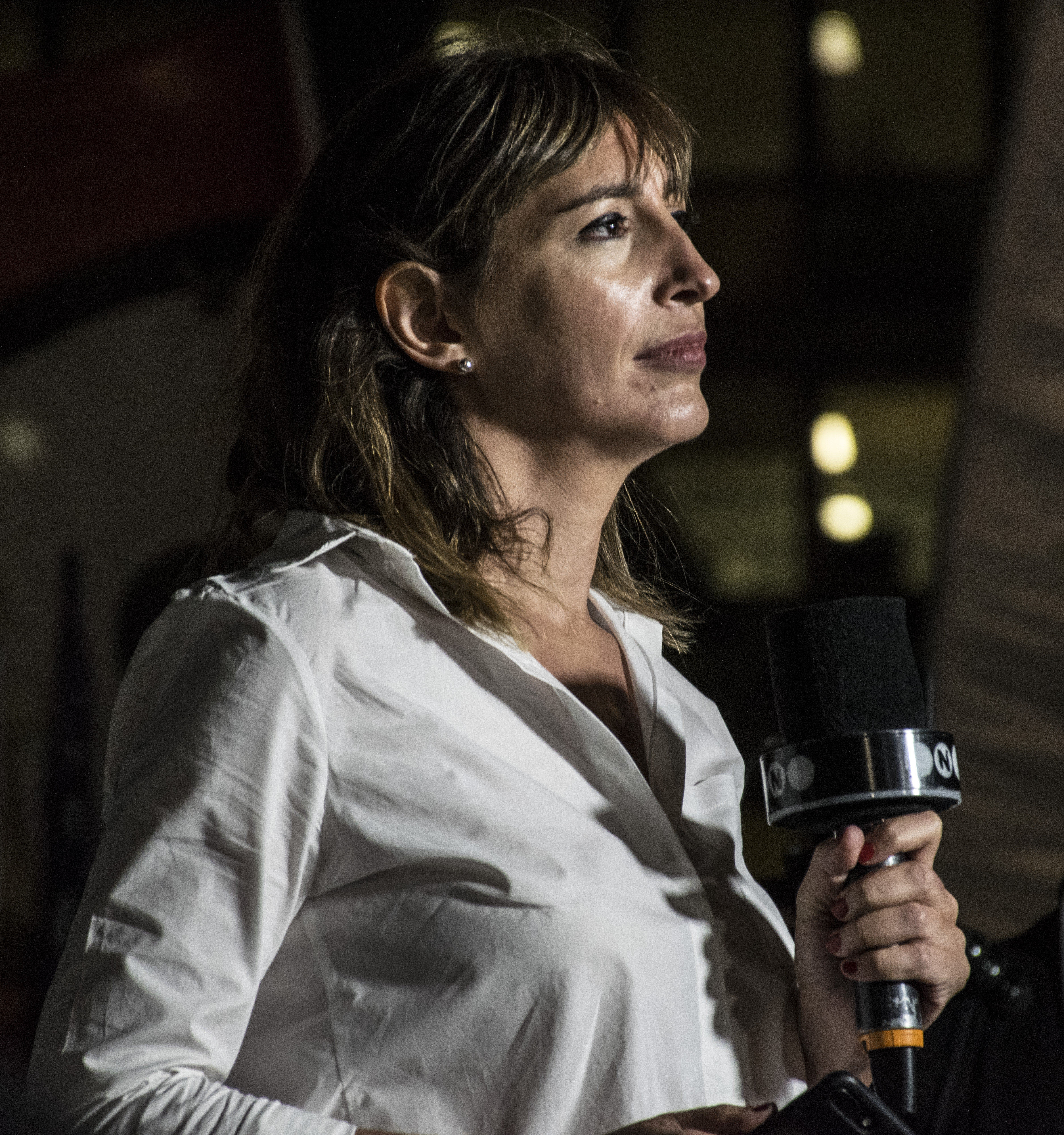 Periodista durante la lectura del documento durante el tercer paro internacional de mujeres en Buenos Aires.